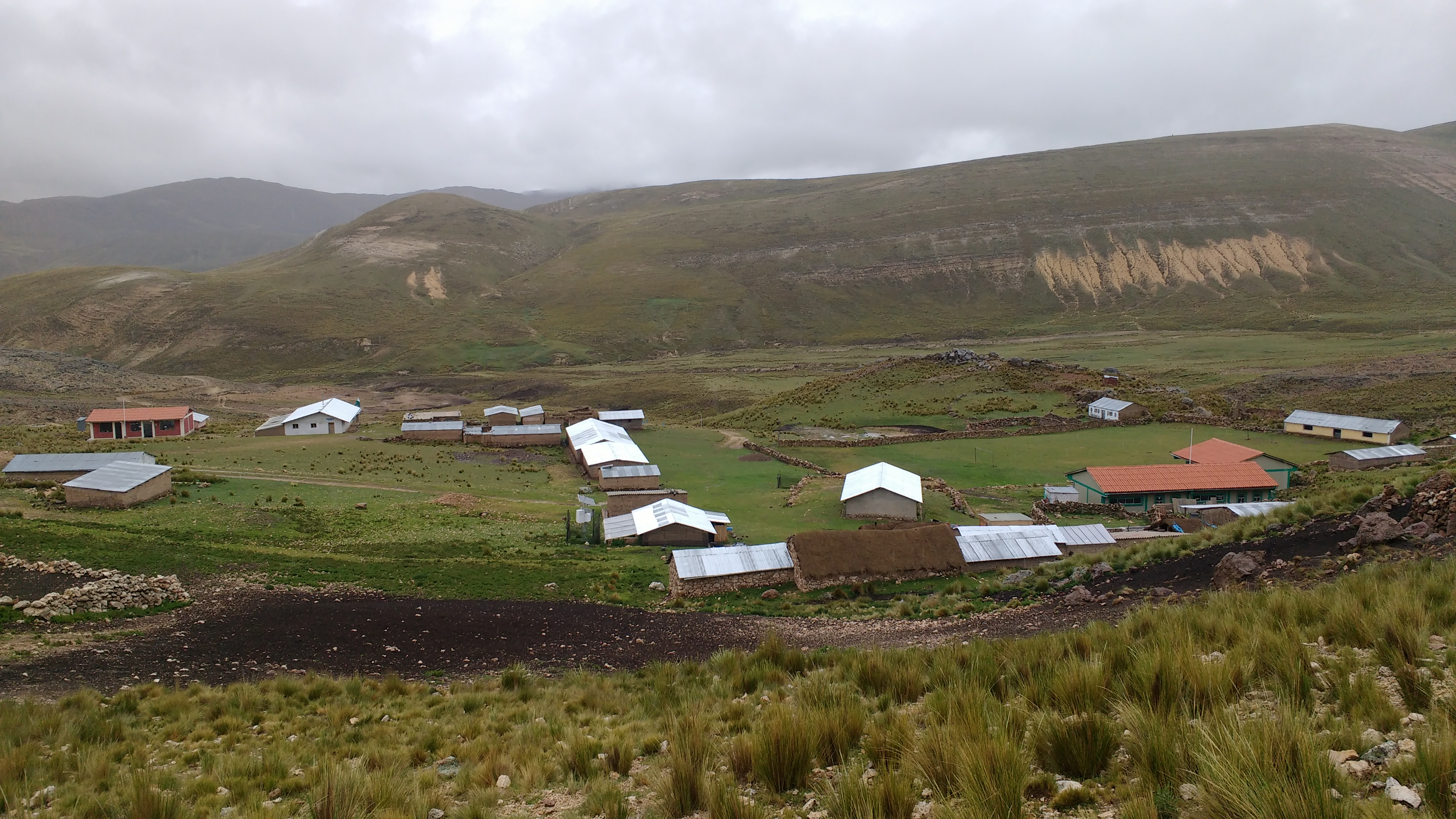 Anexo San Juan de Yanacolpa